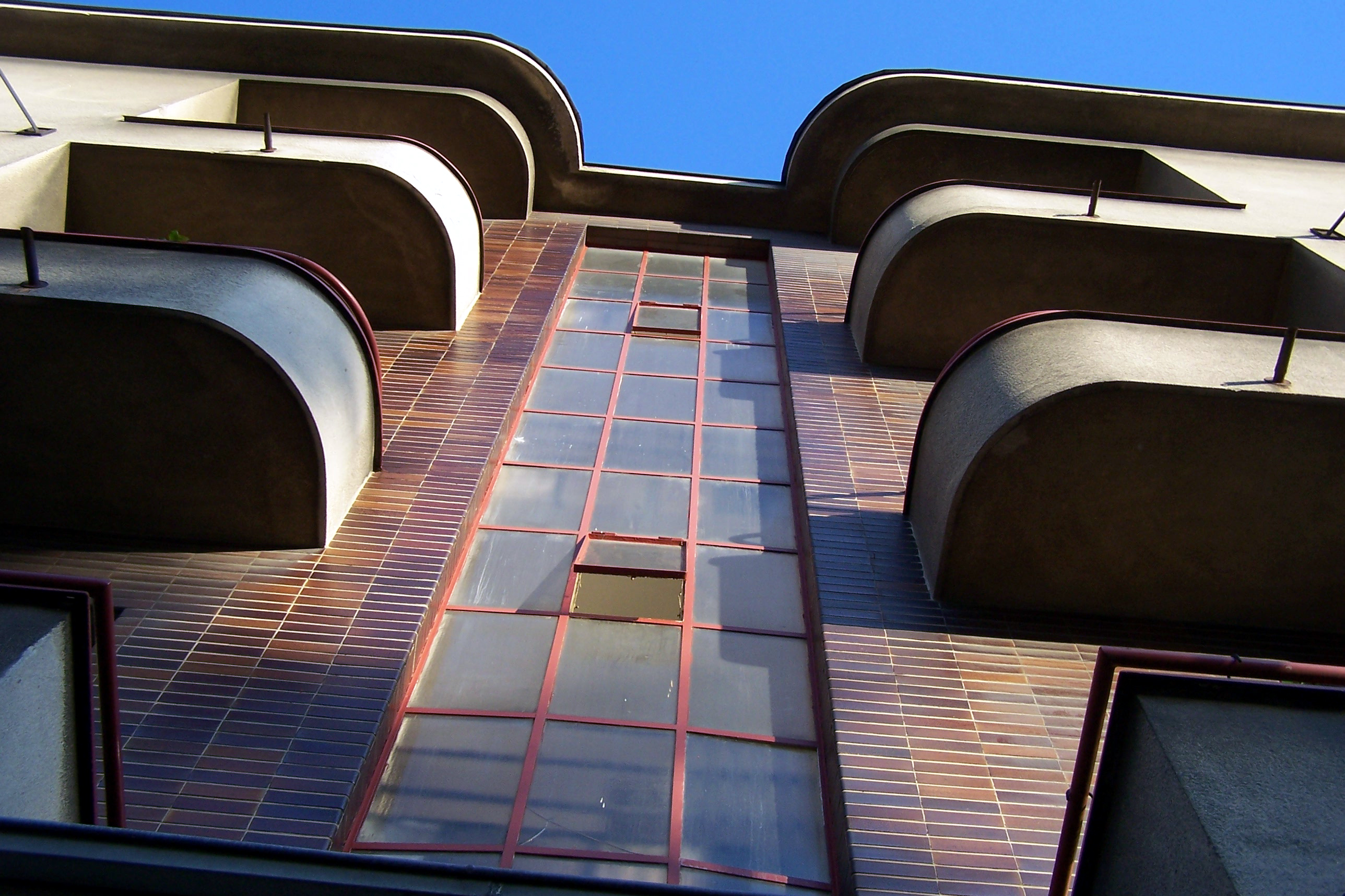 Dům manželů Bubeníčkových v ulici U Husova sboru. Architekt: Karel ŘEPA (1934–1939)